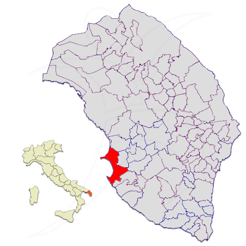 Il territorio del comune di Gallipoli nella provincia di Lecce